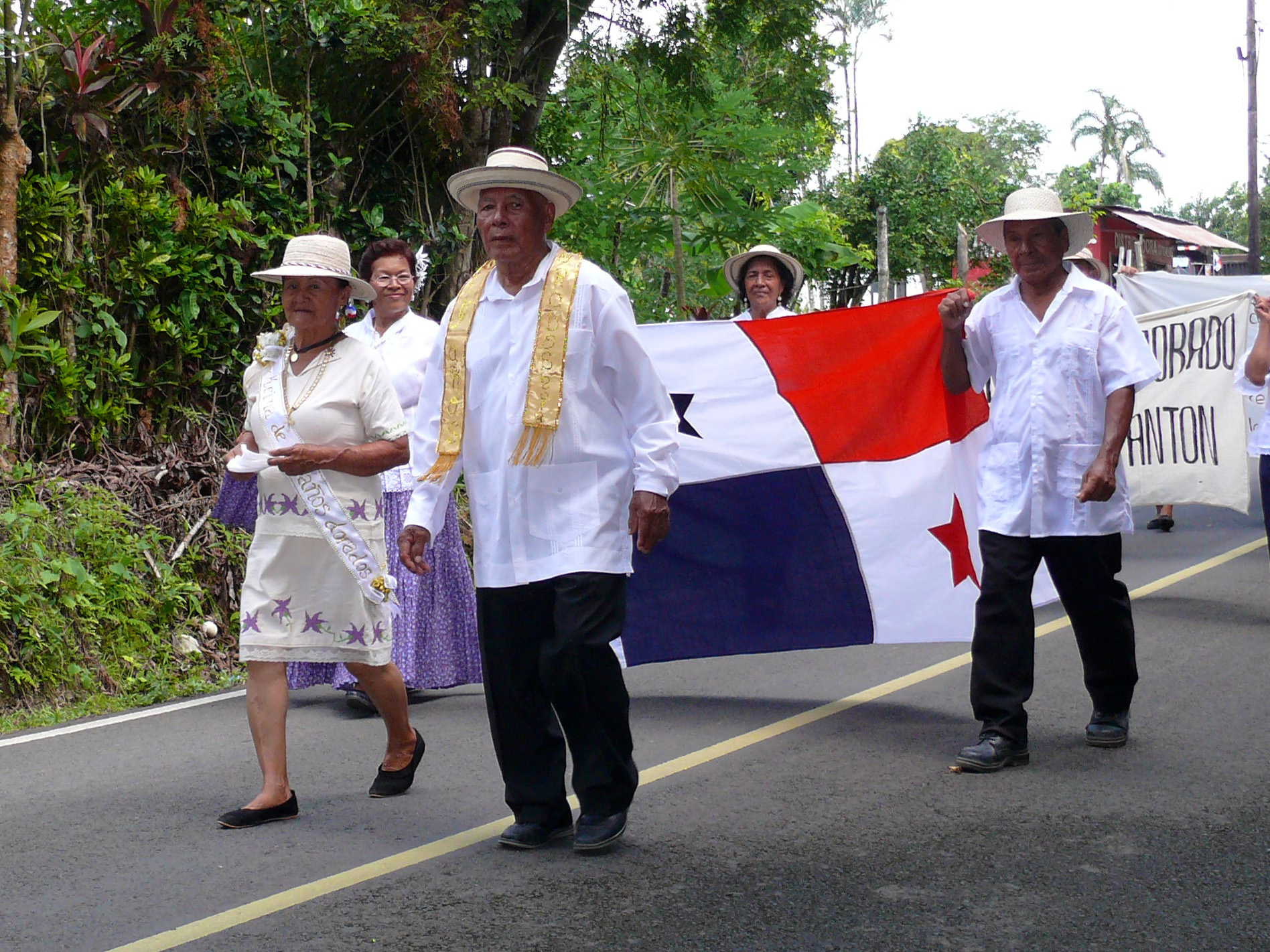 Desfile del 3 de Noviembre de 2013. La Asociación los Años Dorados de Santa Rita de Antón es un grupo conformado por adultos mayores de la comunidad de Santa Rita de Antón.